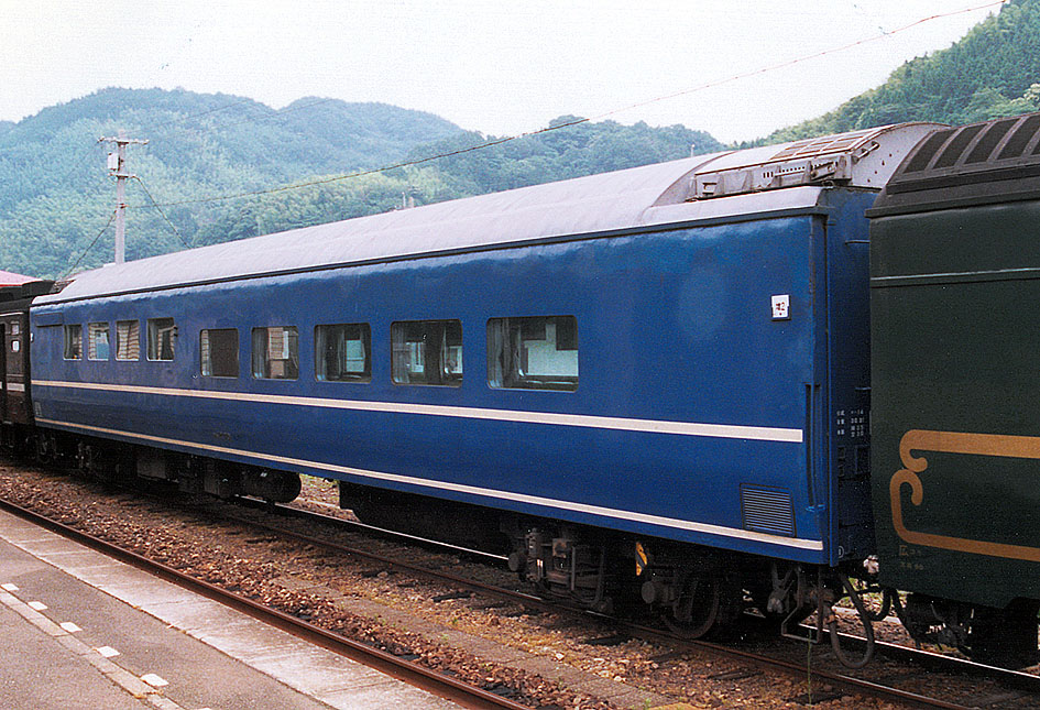 JR西日本 オハ14 701「サロンカー」（画像はSLやまぐち運転時）